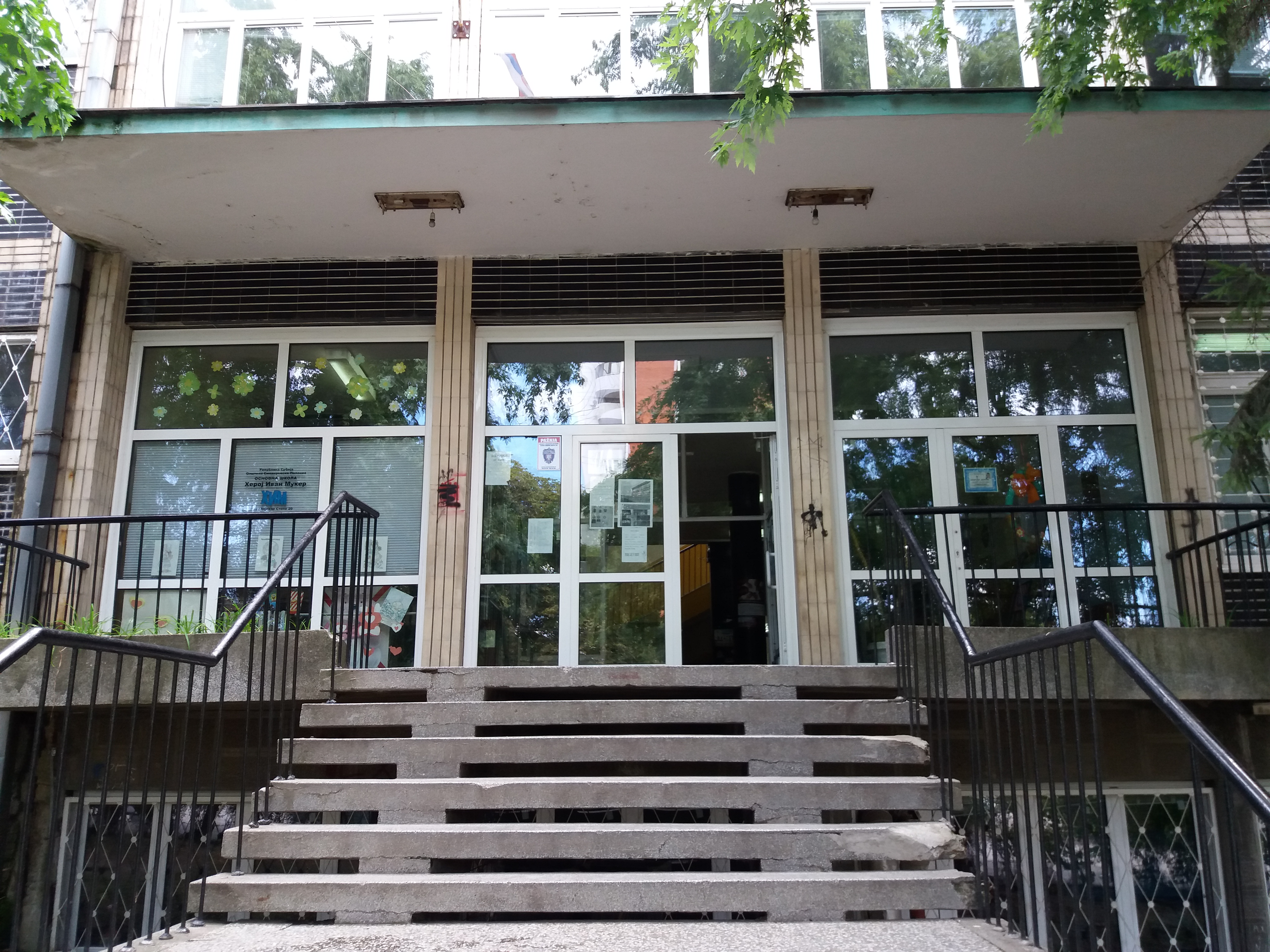 Srpski (latinica): Osnovna škola Heroj Ivan Muker, Smederevska Palanka